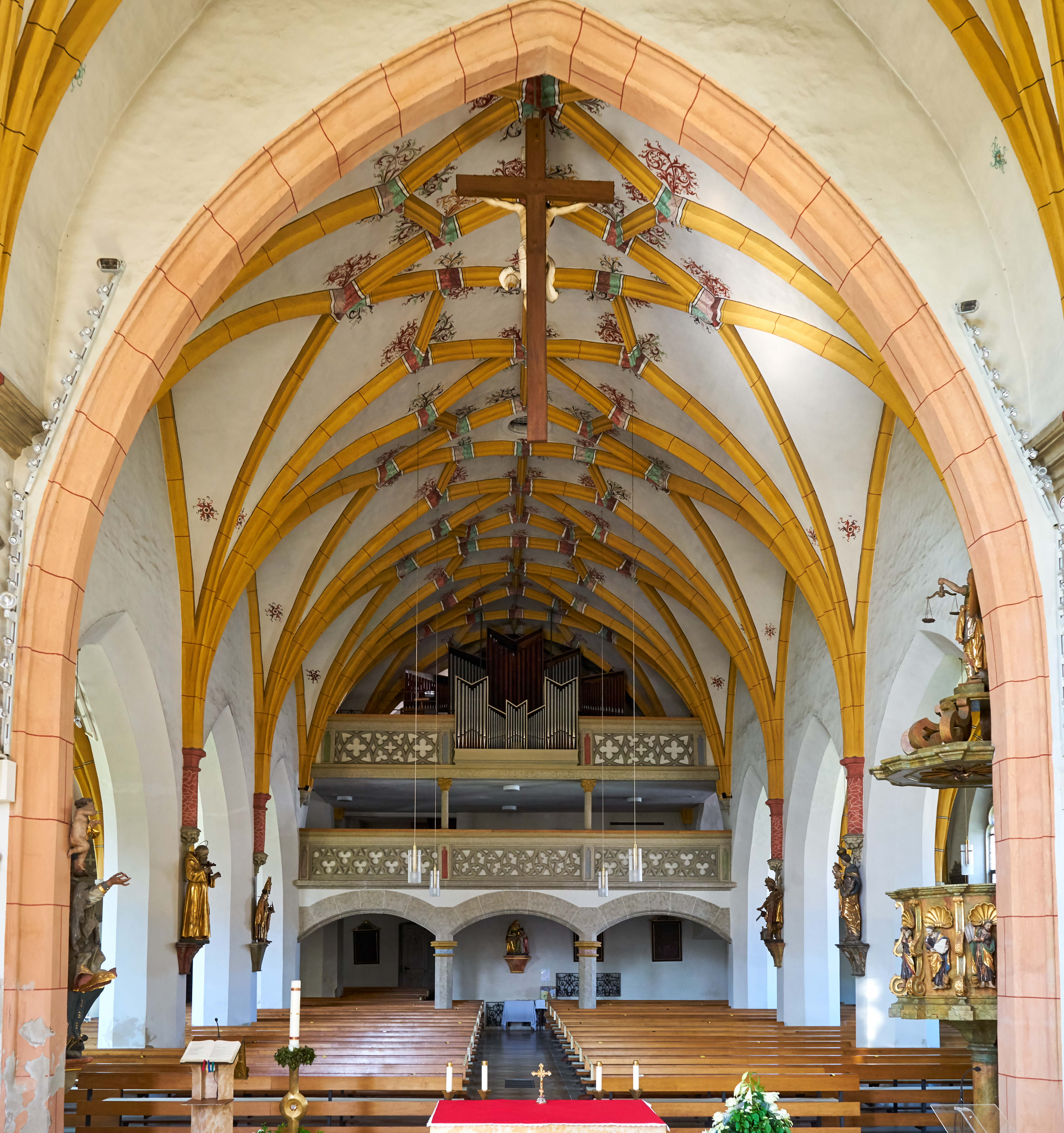 Pfarrkirche Mariä Himmelfahrt Rotthalmünster, Blick in das Langhaus zur doppelstöckigen Empore